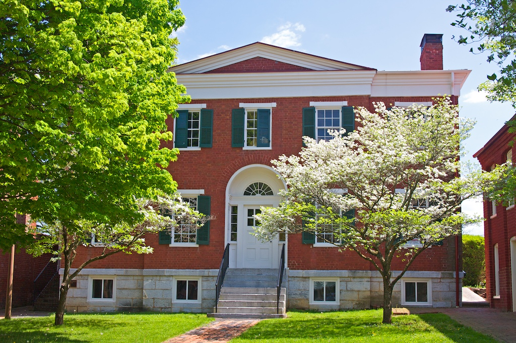 Kappa Alpha House